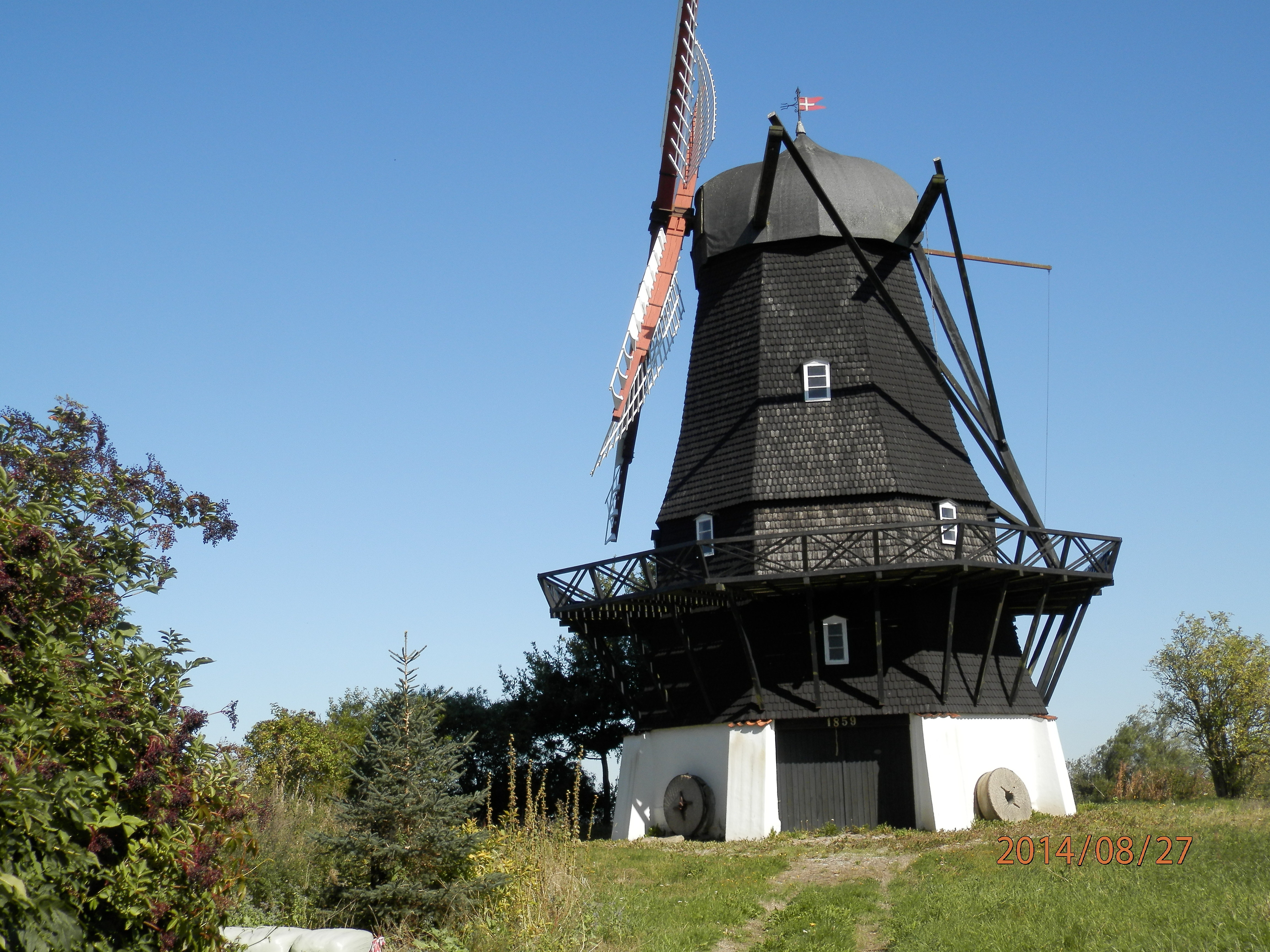 Øksnebjerg Mølle, Fyn